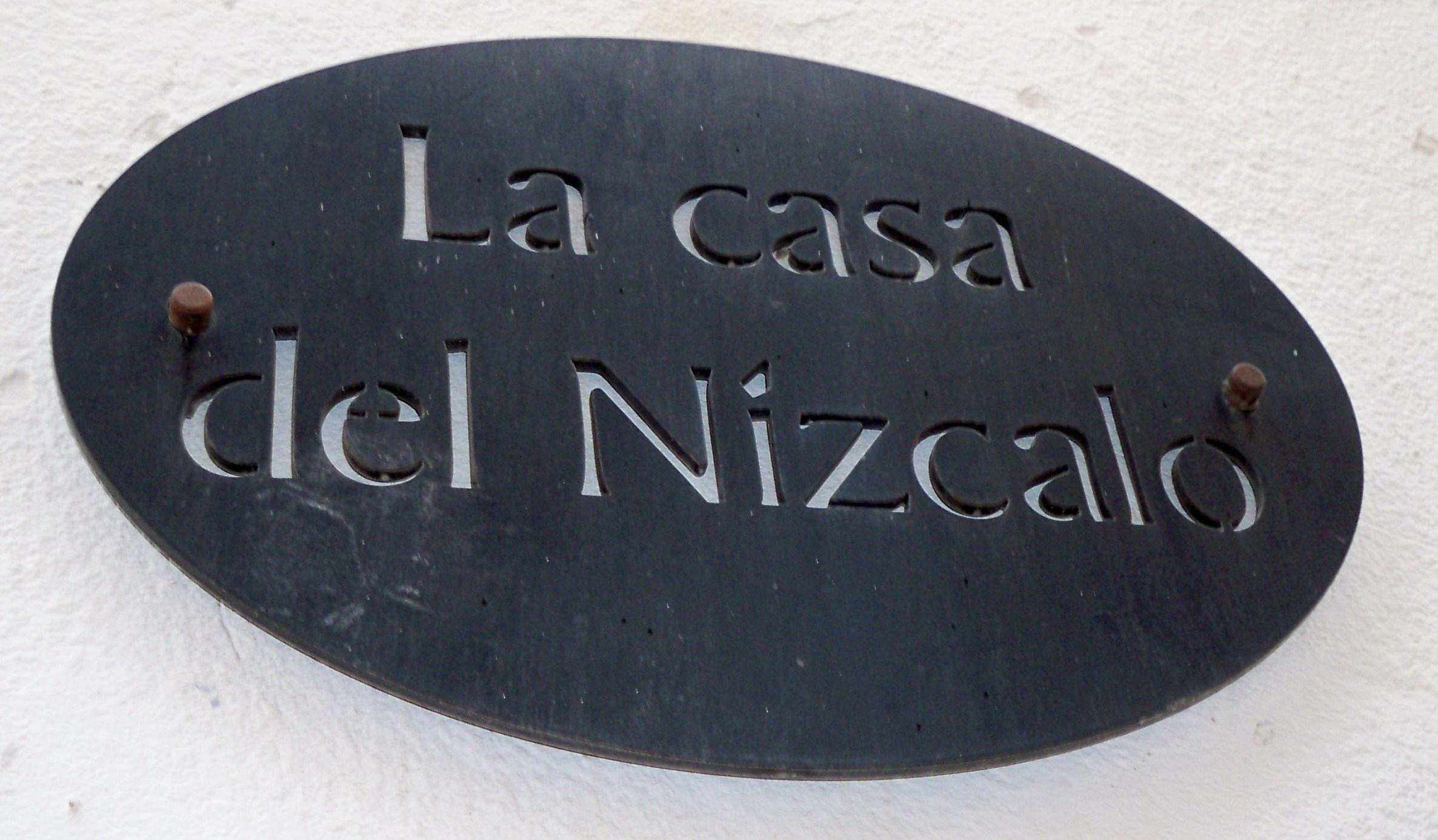 Cartel anunciador del museo micológico de Molinicos (Albacete)